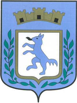 Blason de Revest du Bion, Alpes de Haute Provence, France